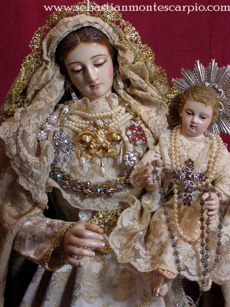 Santa María La Blanca de Málaga.Anonimo XIX.